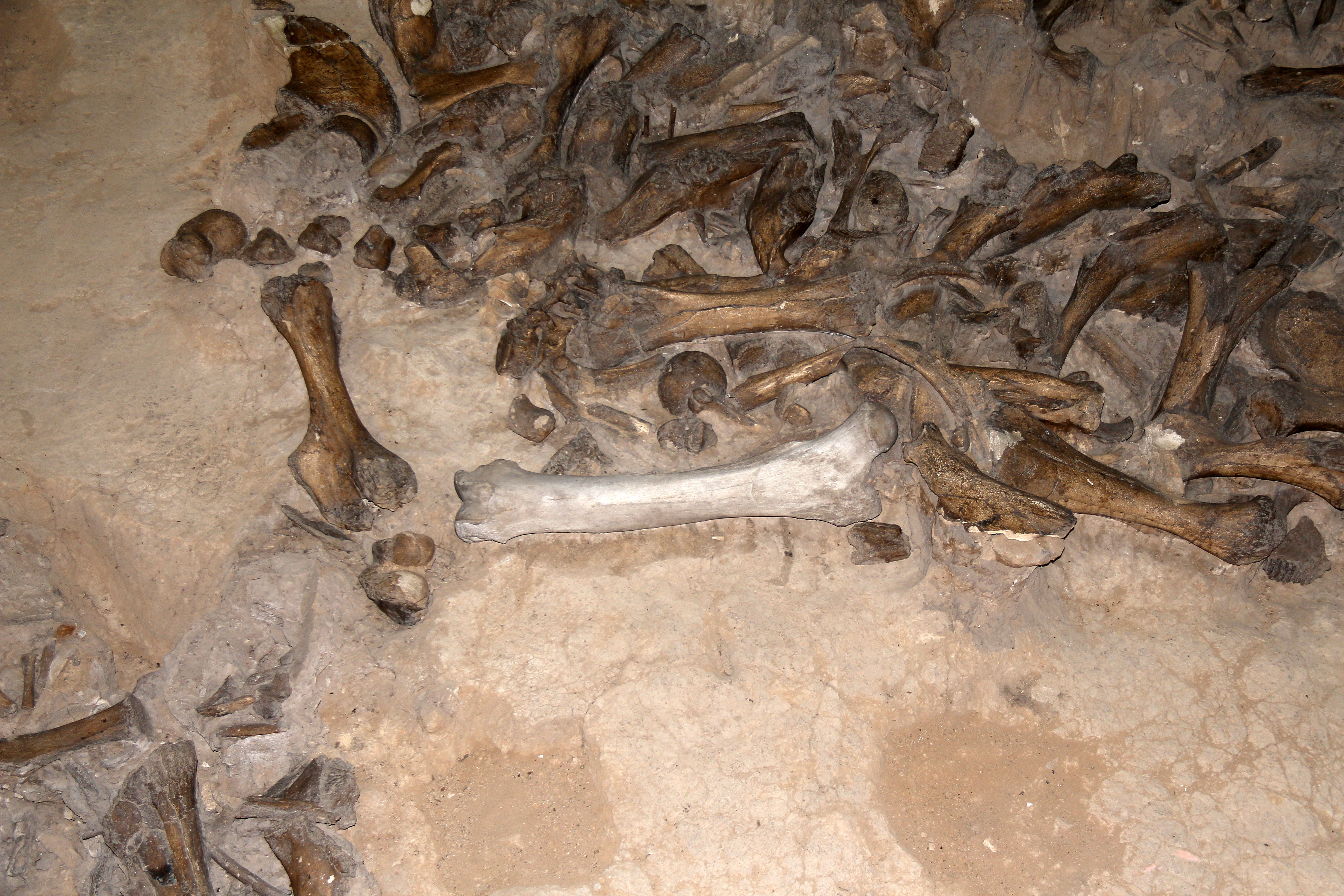 Кости мамонта в основании жилища, музей Костёнки